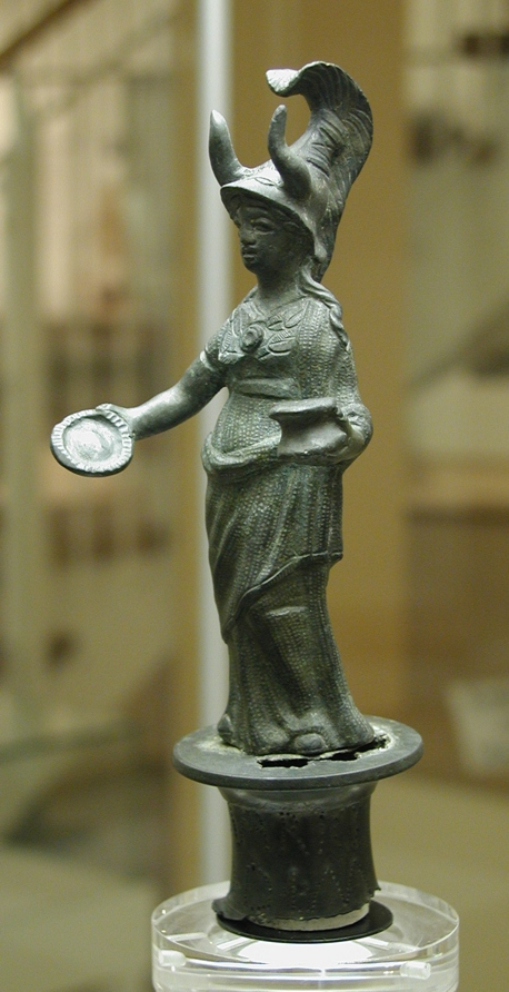 In keltischem Fundzusammenhang geborgene Statuette der Göttin Athene/Minerva aus Aschheim-Dornach.